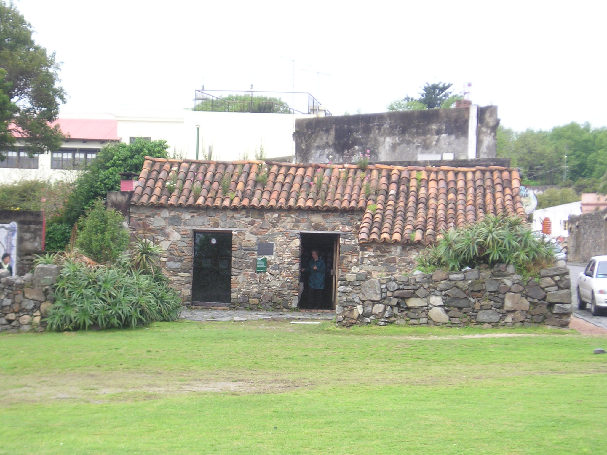 Museum of azulejo tiles in Colonia del Sacramento, Uruguay